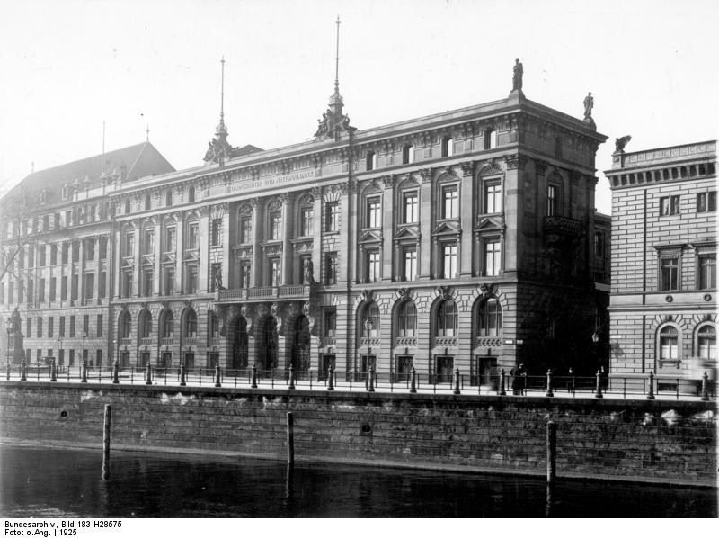 ADN-Bildarchiv Berlin 1925 Das Hauptverwaltungsgebäude der "Darmstädter und Nationalbank" auf dem Schinkelplatz Nr. 1-4. Aufnahme: Transocean